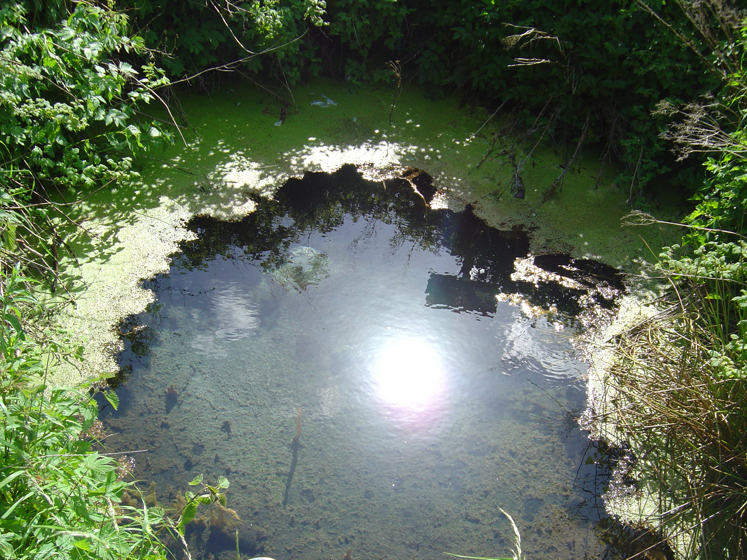 Wasserstelle im Habernisser Moor/Niederung